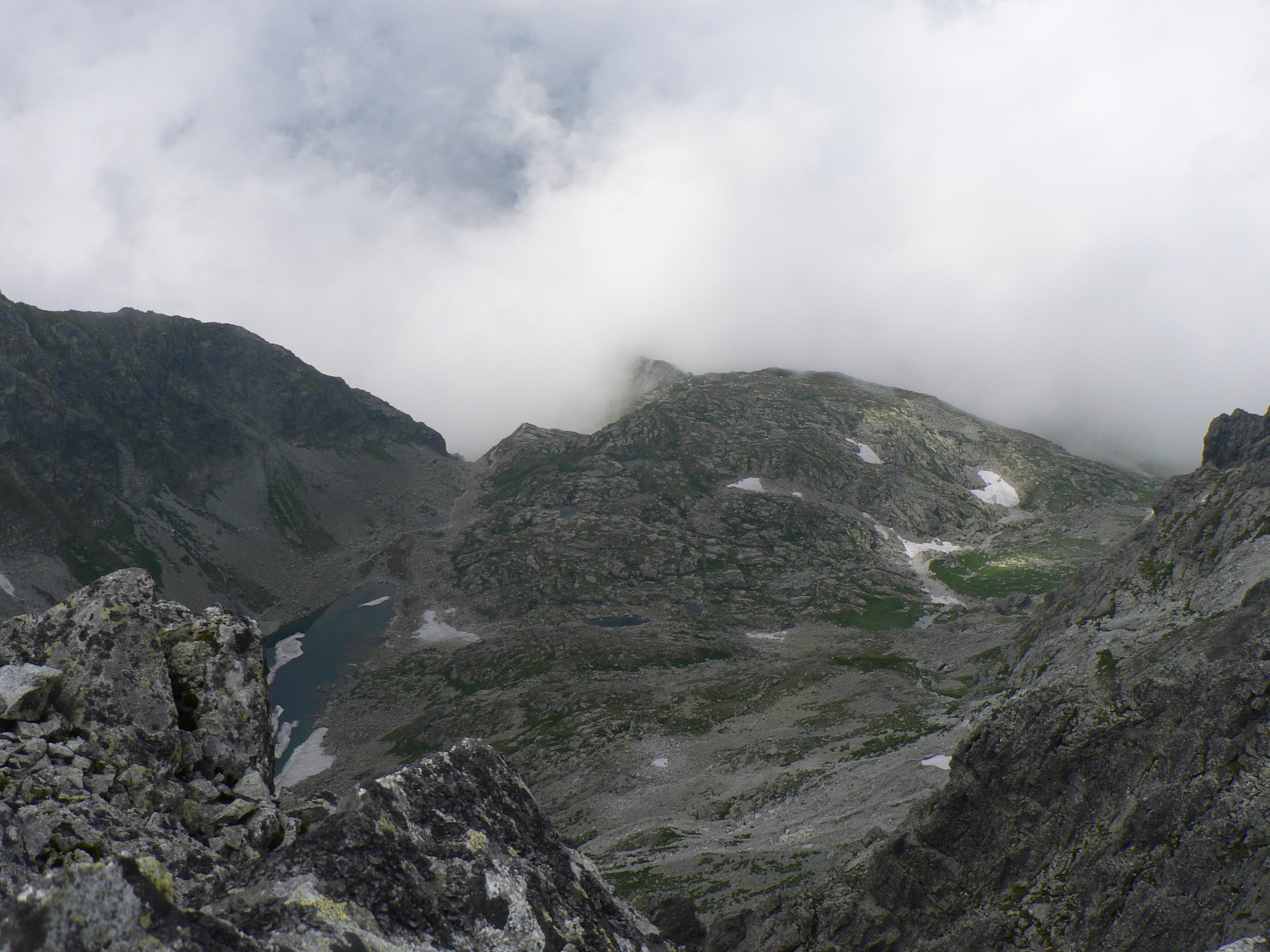 Kocioł Zmarzłego Stawu z Małej Wysokiej